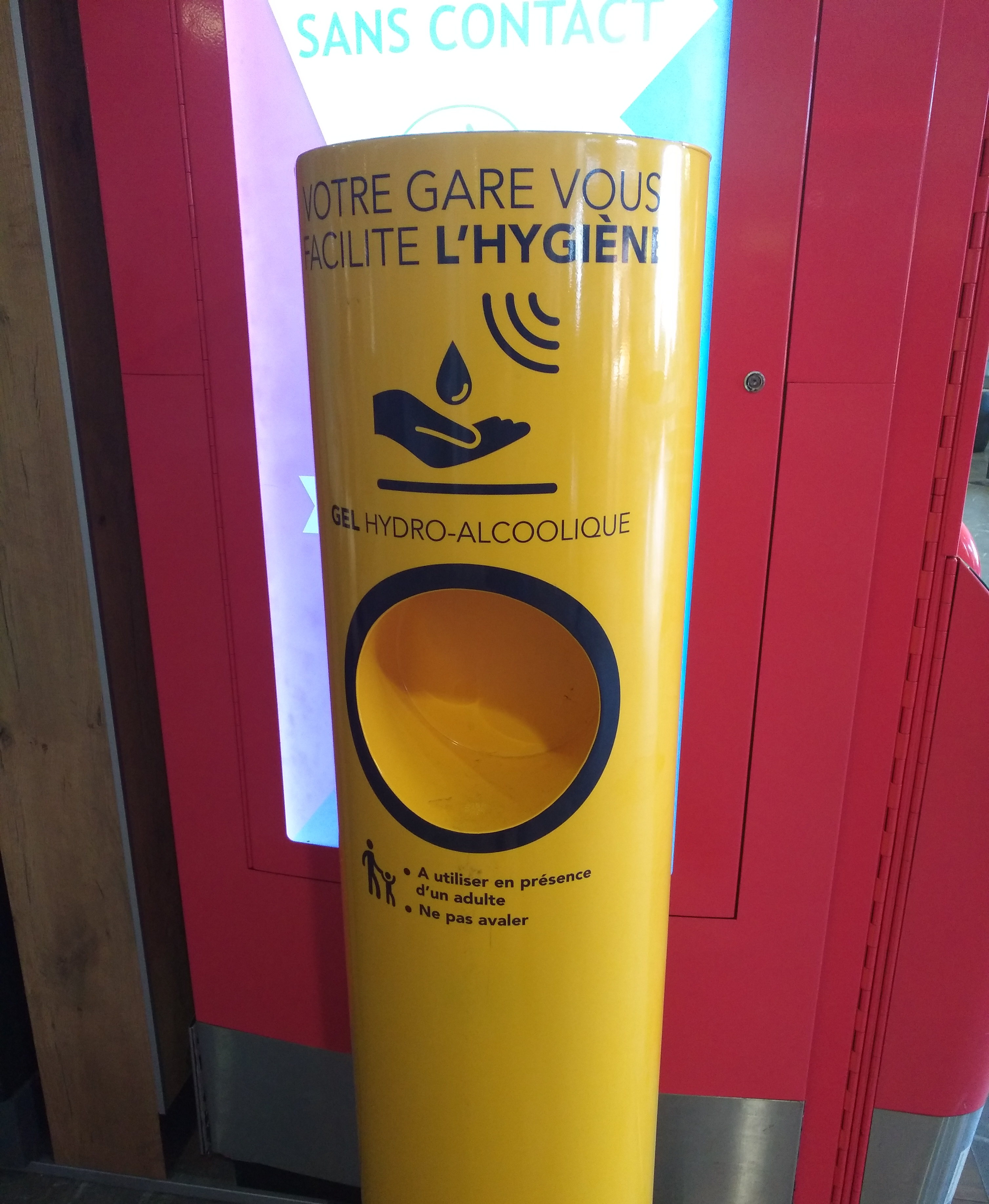 Distributeur de gel hydro-alcoolique dans la gare de Lyon-Perrache.